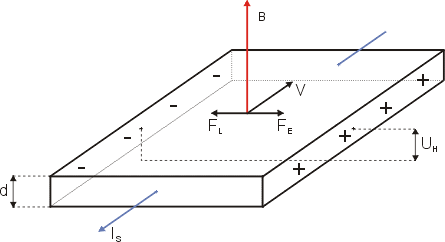 efekt halla, hall effect